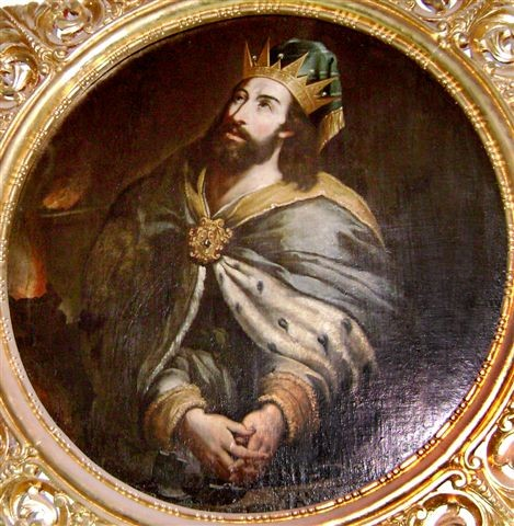 "Rey Manassés". Obra de Nicolás Javier Goribar, pintor de la Escuela Quiteña del siglo XVII. Pertenece a una obra más grande llamada "Los Reyes de Judá".